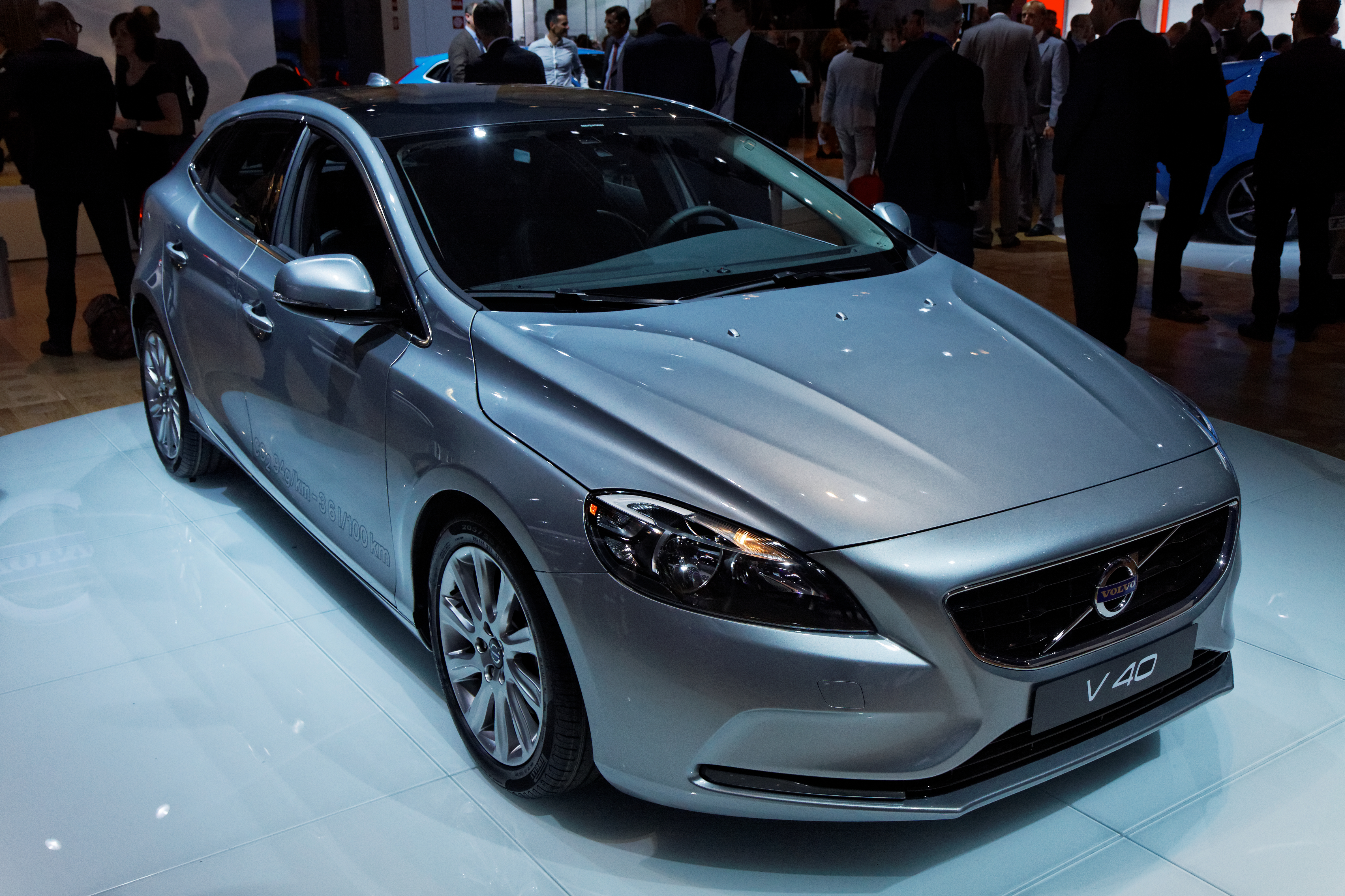 Une Volvo V40 présentée lors du Mondial de l'Automobile de Paris 2012.